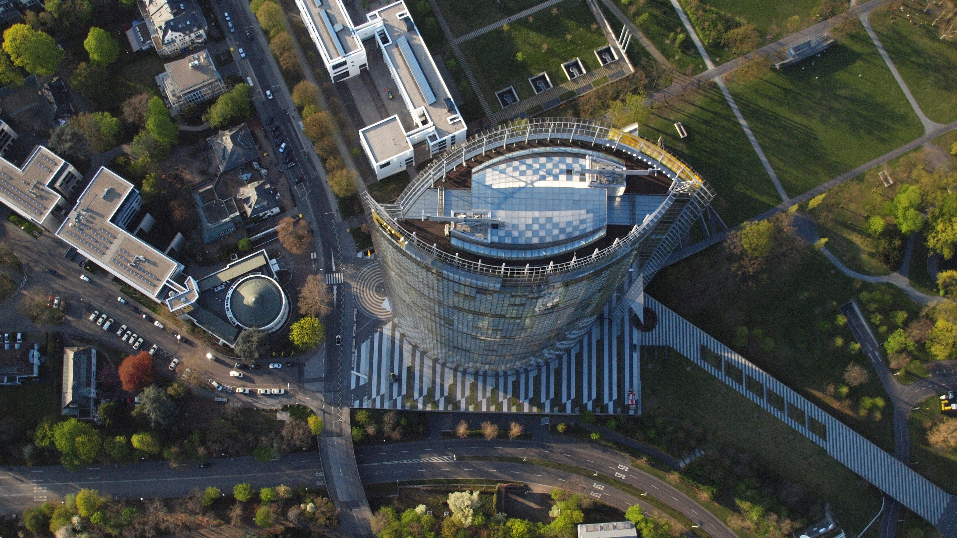 Post Tower, Bonn: Senkrechtaufnahme aus südlicher Richtung; vorne die Franz-Josef-Strauß-Allee